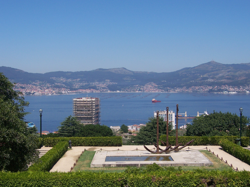 Vista de la ría de Vigo en las cercanías del museo O Castro de Vigo